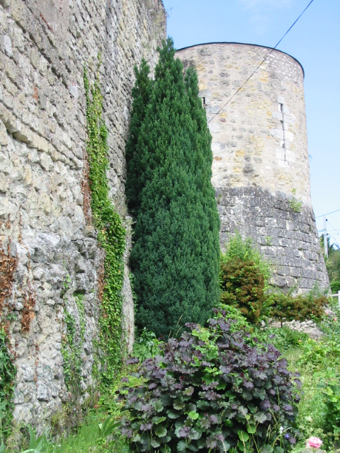 Tour défensive XIIIème s.